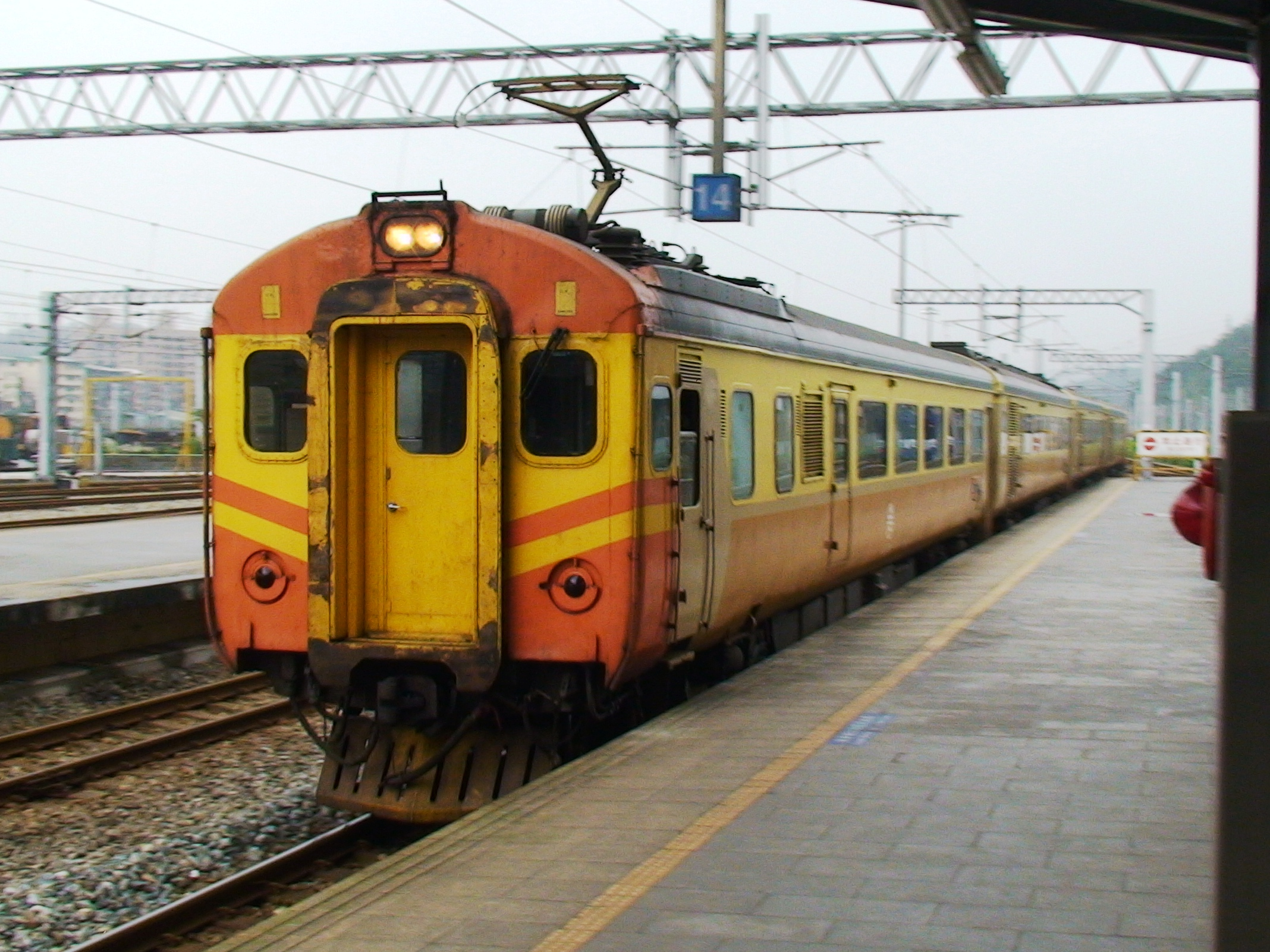 臺灣鐵路管理局EMU100型電聯車經過七堵車站（入線）。